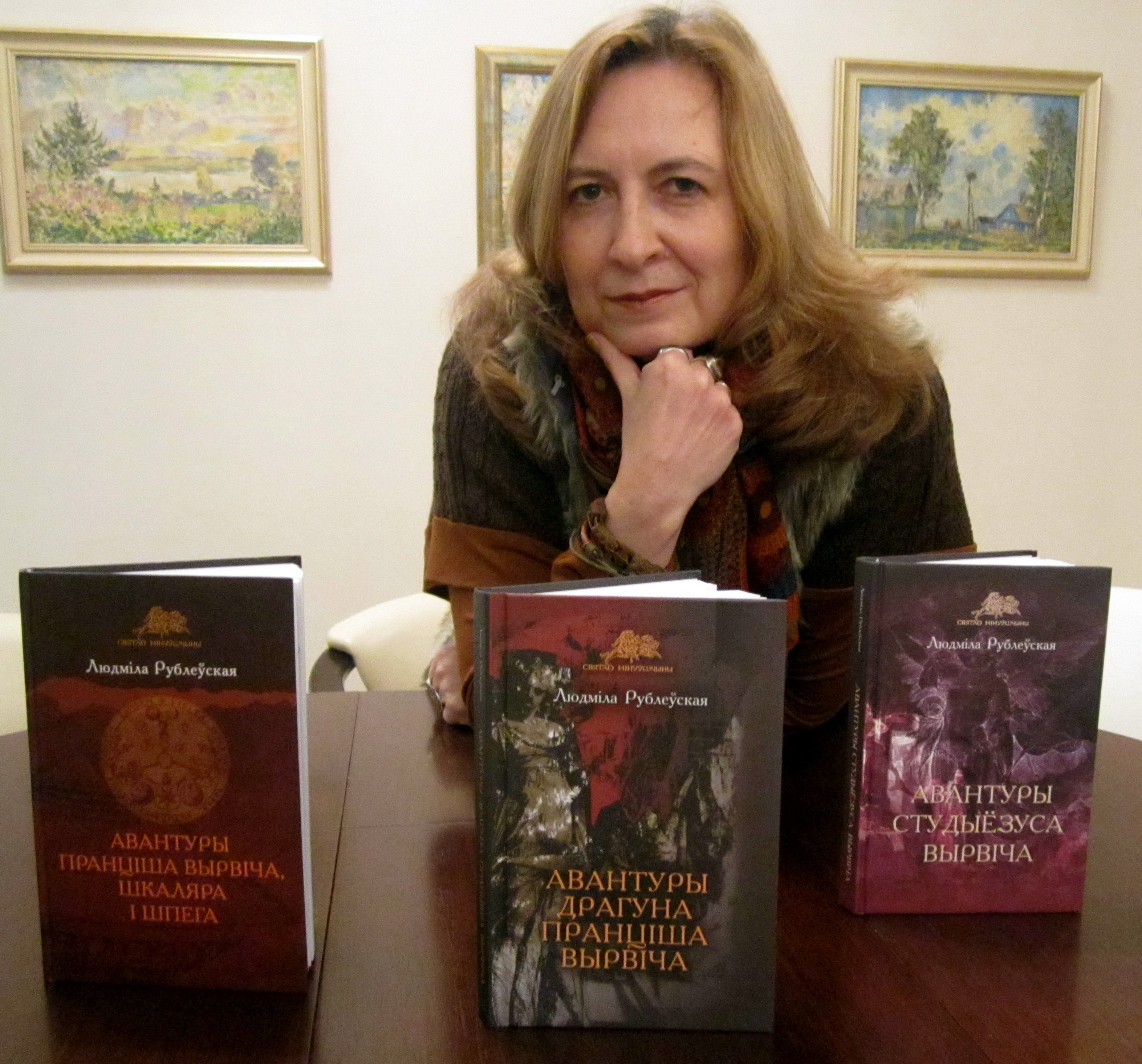 Людміла Рублеўская са сваёй трылогіяй "Авантуры Пранціша Вырвіча"